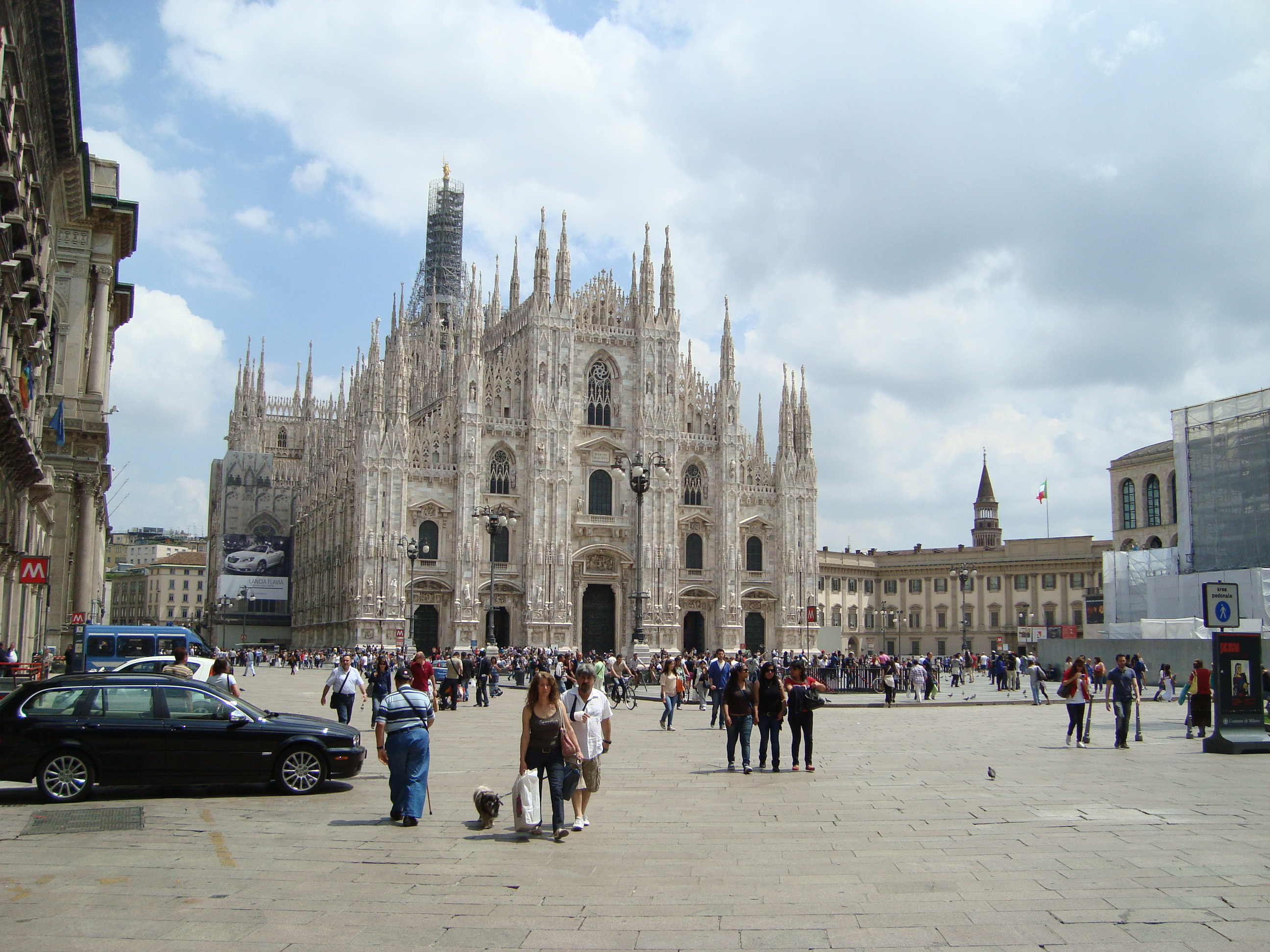 Milano